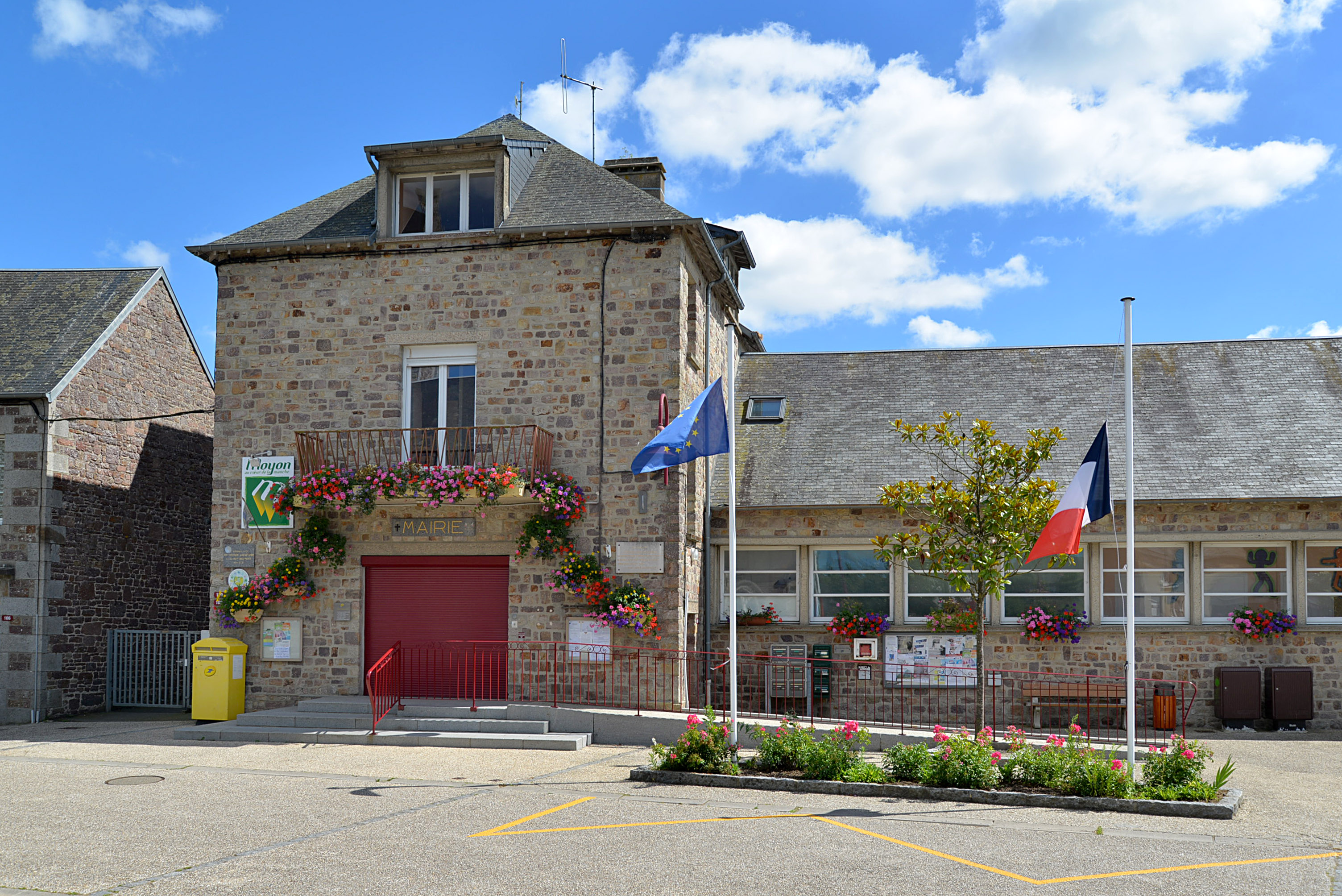 Moyon (50)